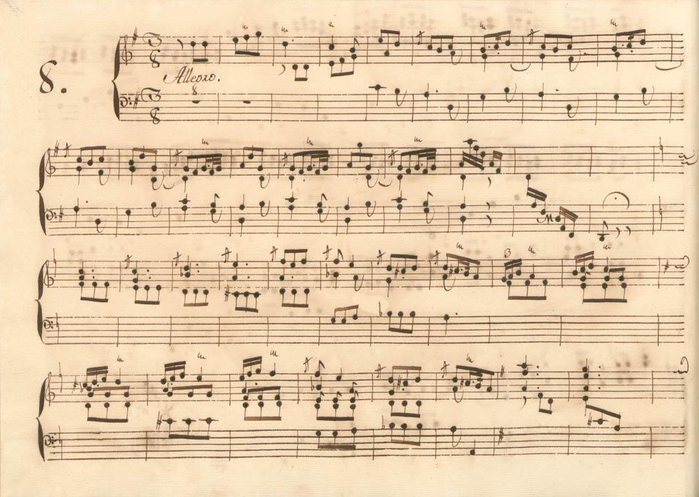 La sonate K. 521, telle qu'elle se présente dans le manuscrit de Parme, volume XV no. 8.